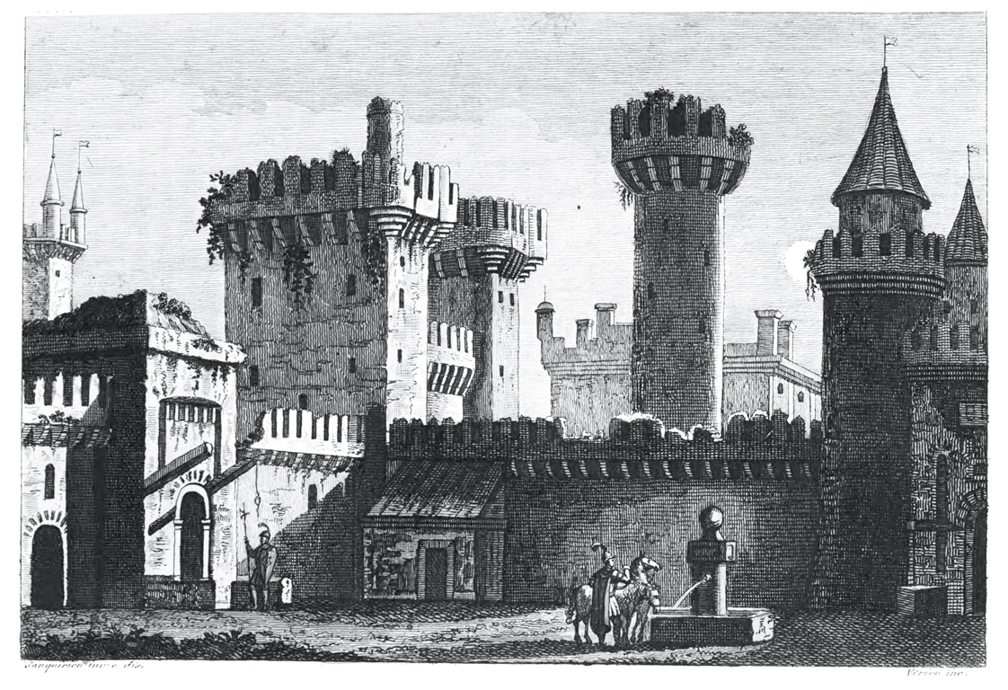 Gravure du Château de Chandée au Moyen Age.